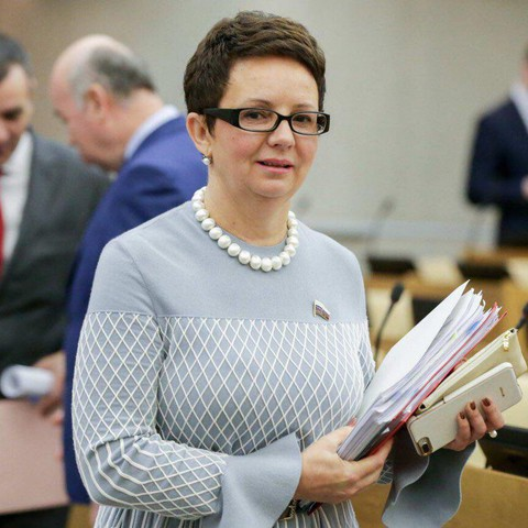 О.В. Савастьянова депутат Государственной Думы